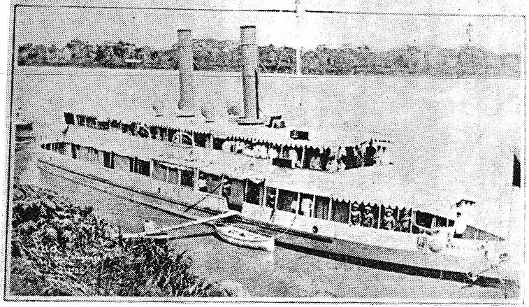 BAP America en Iquitos en 1905